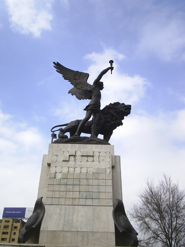 Monumento regalado por el Reino de Italia a la República de Chile, 1910. Localizado actualmente en la Plaza Italia, Santiago de Chileángel y león